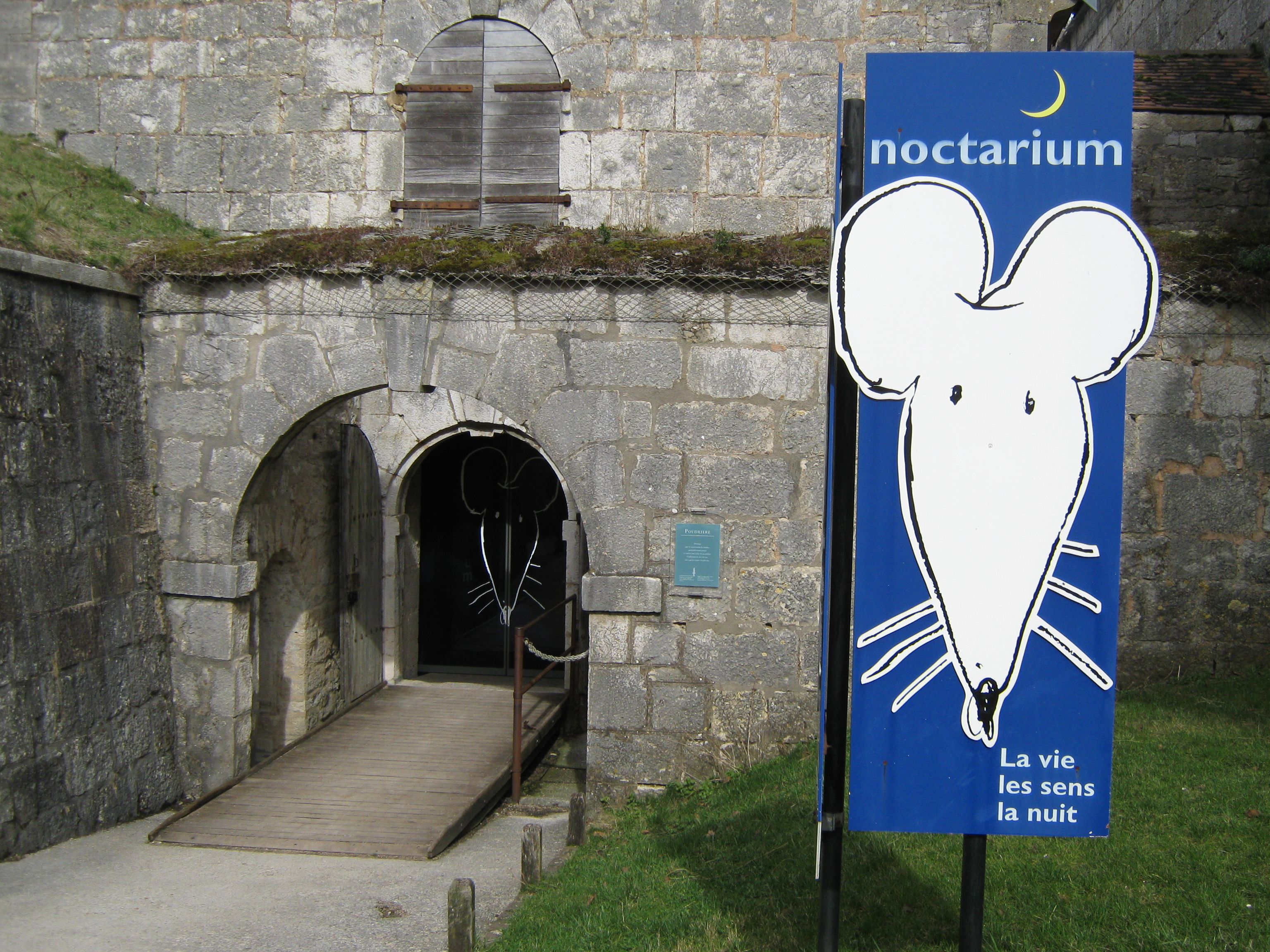 noctarium